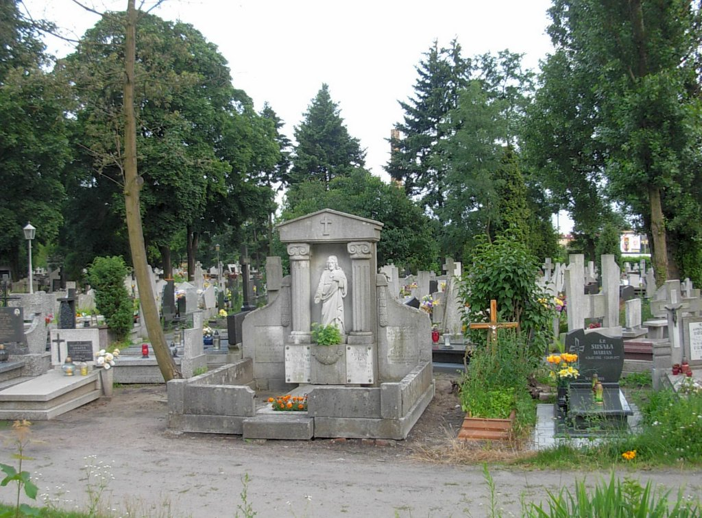 Cmentarz Nowofarny Bydgoszcz